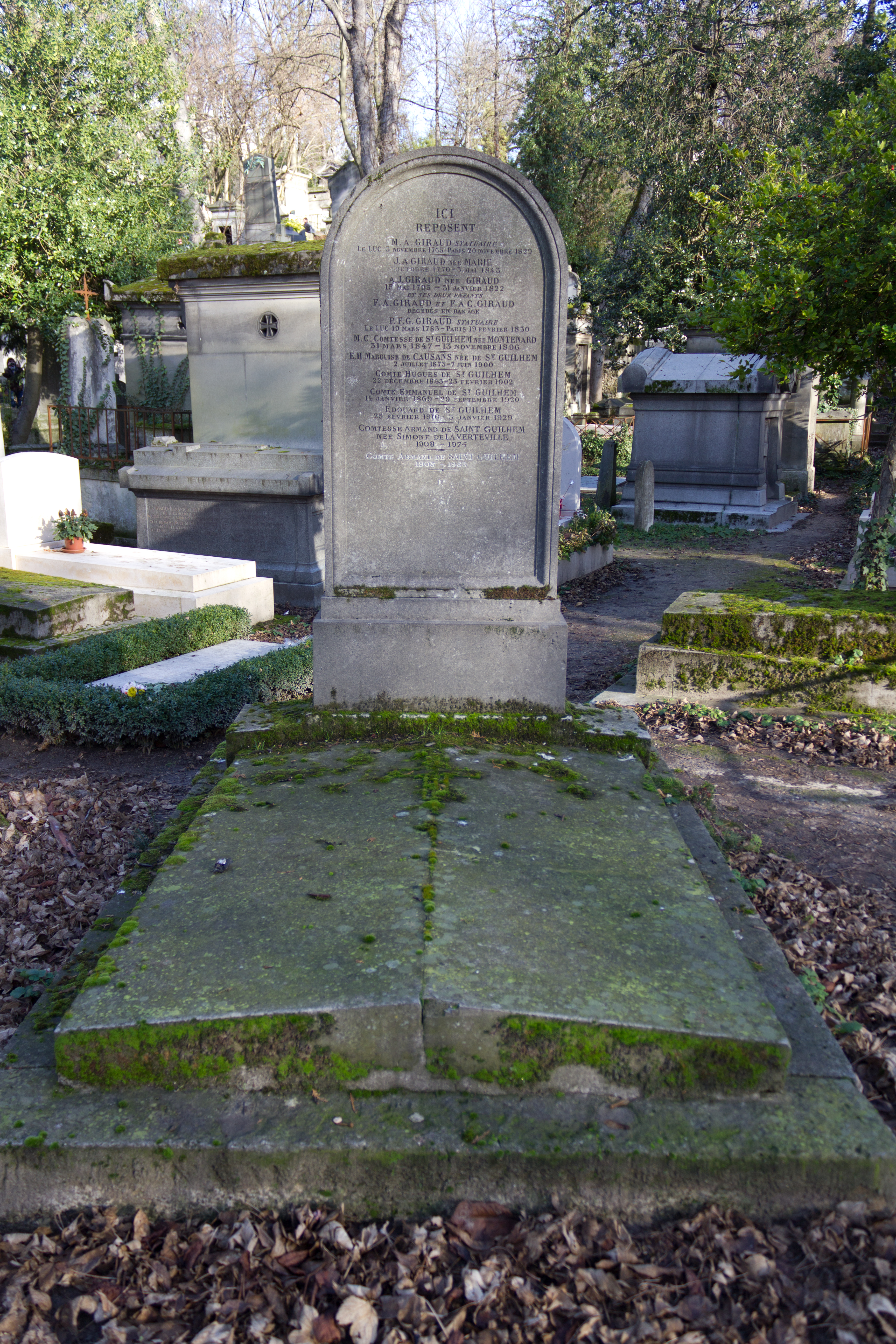 Vue d'ensemble